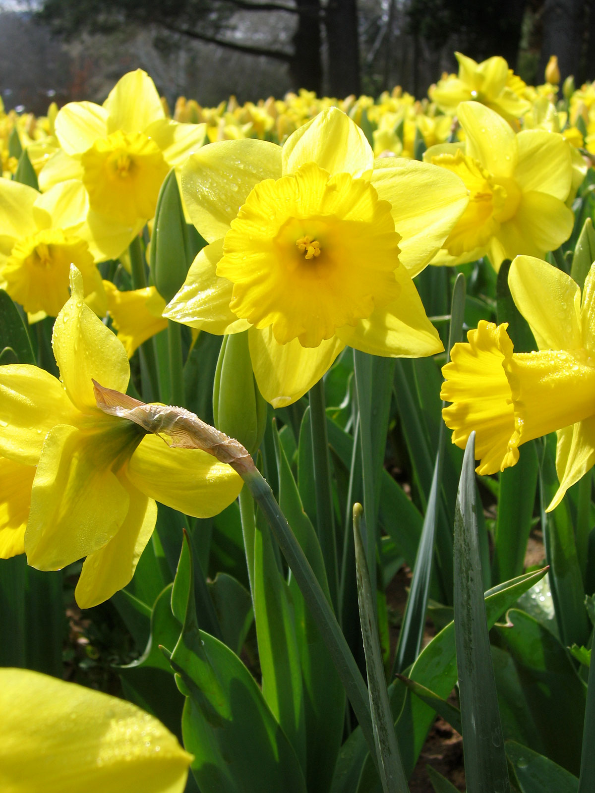 Yellow Daffodils, 2005 Floriade, Canberra